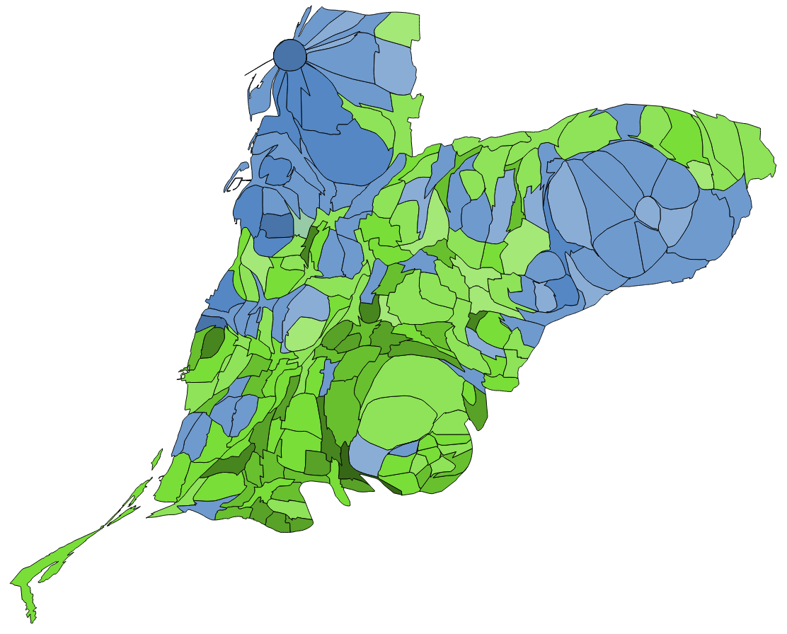 顏色對照表